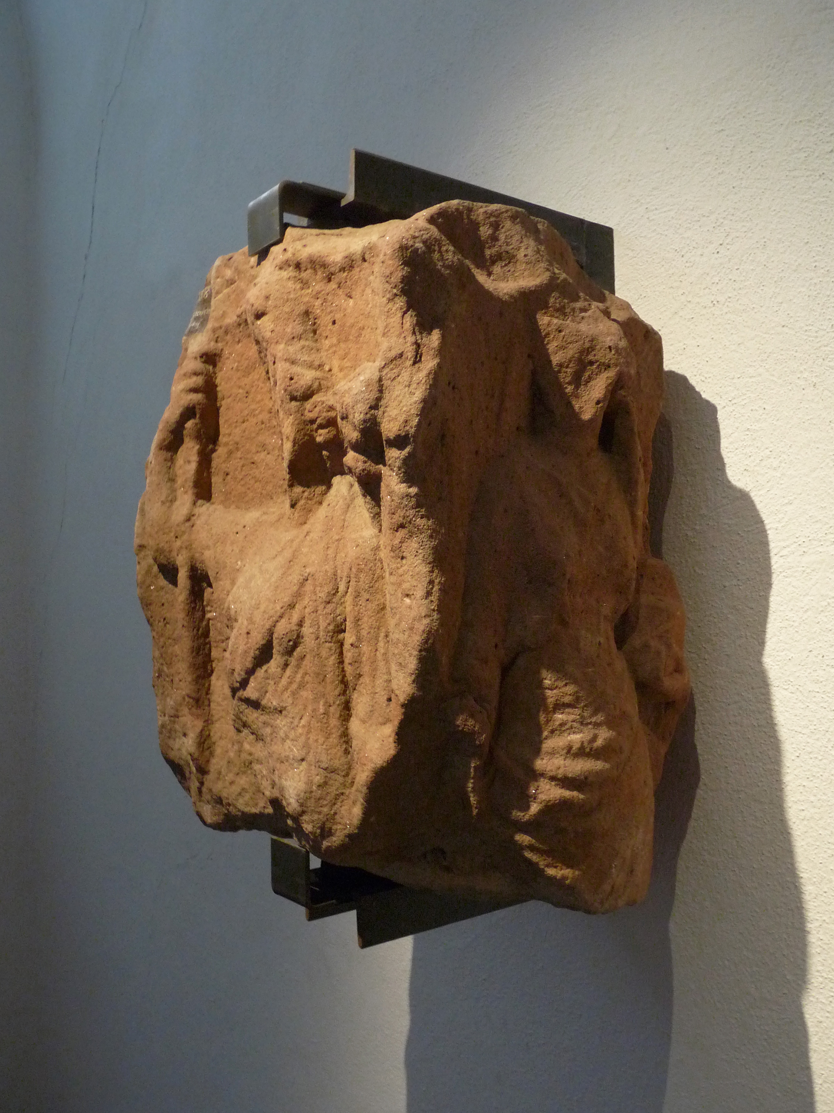 Stèle à quatre dieux : seuls Hercule, Minerve et Junon sont conservés. 3e siècle après JC. Trouvée à Leutenheim, Hexenberg. Musée archéologique de Strasbourg